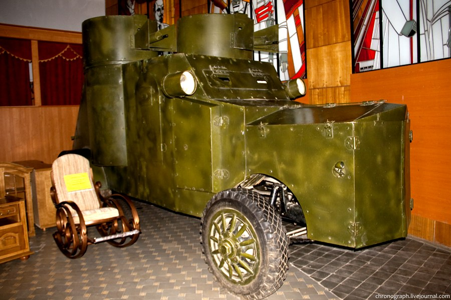 Бронеавтомобиль "ФИАТ" - "Ижора". Военно-исторический музей, Самара, Россия